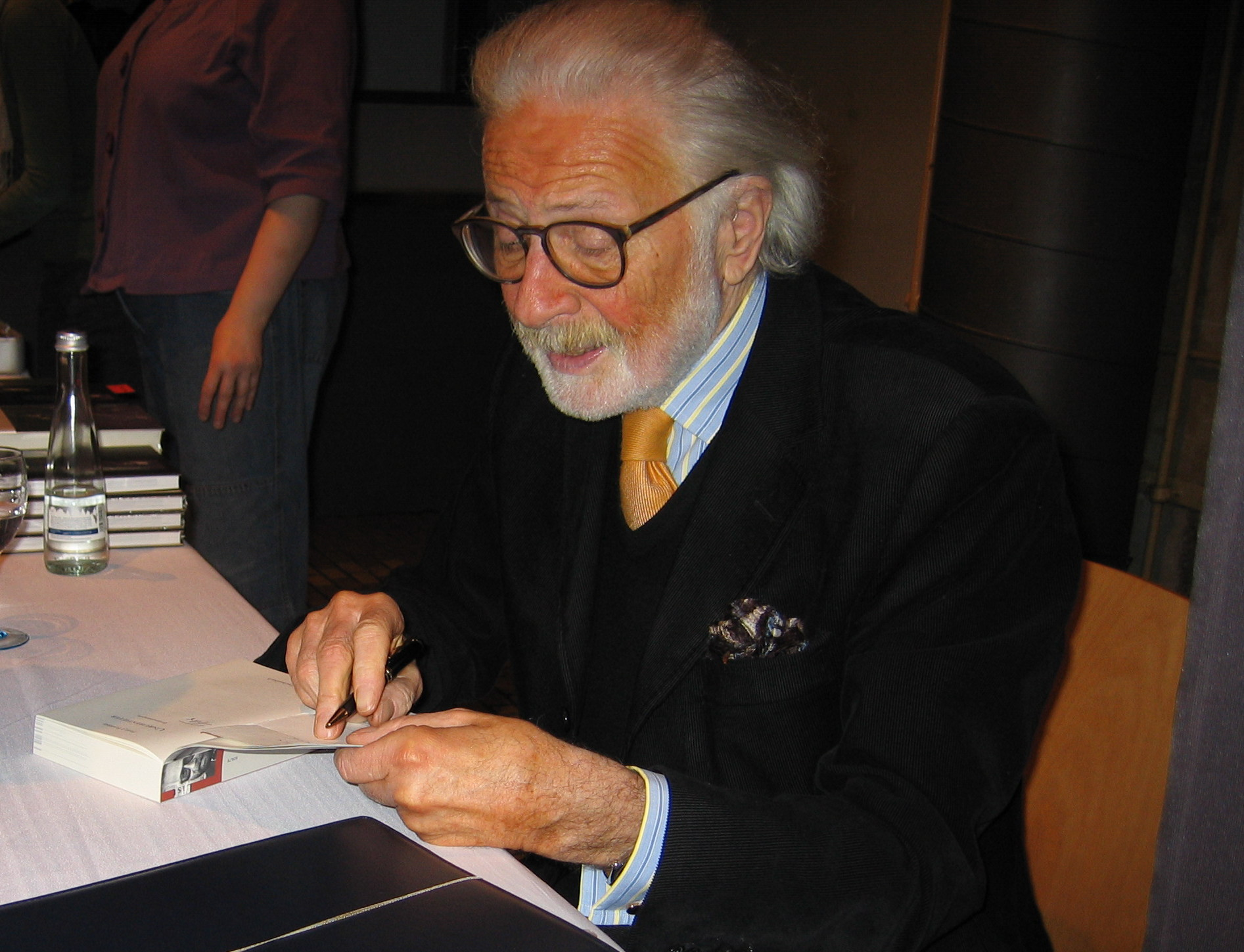 Publizist Fritz J. Raddatz nach einer Podiumsdiskussion beim Literaturfest lesen.hören in der Mannheimer Alten Feuerwache